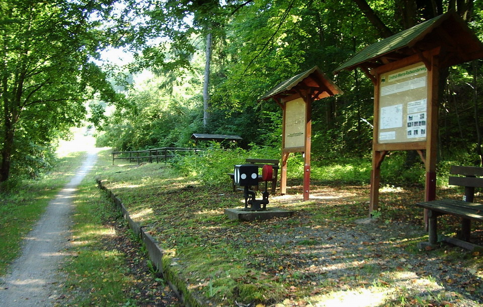 Ehemaliger Haltepunkt Normannstein der Vogteier Bimmelbahn